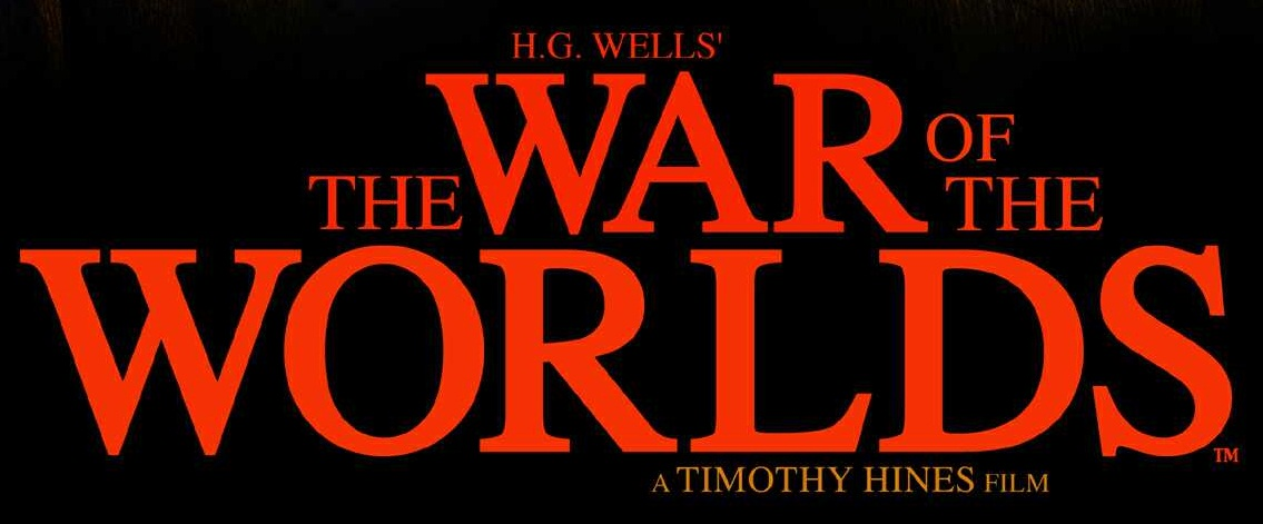 Offizielles Logo von H. G. Wells' The War of the Worlds (Film)